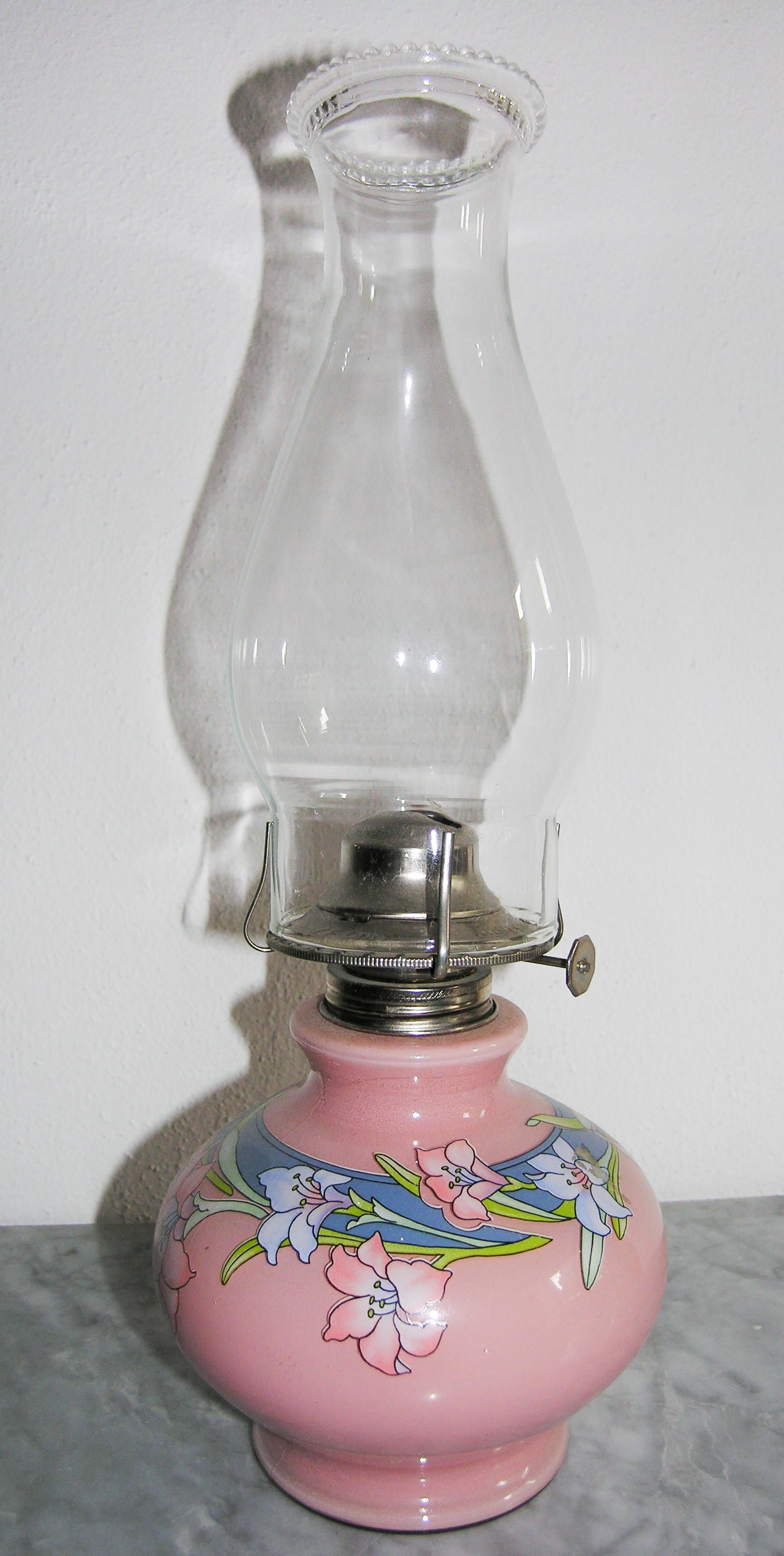 Swiss kerosene lamp